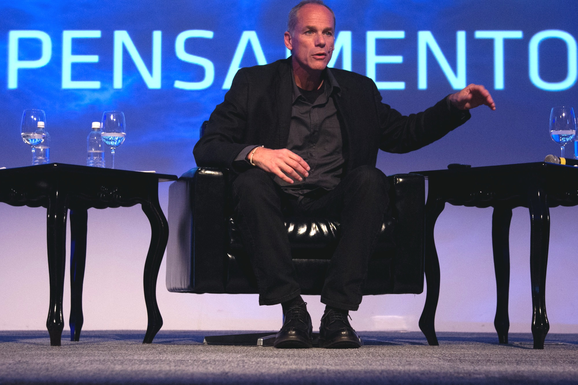 Marcelo Gleiser no Fronteiras do Pensamento Florianópolis 2013